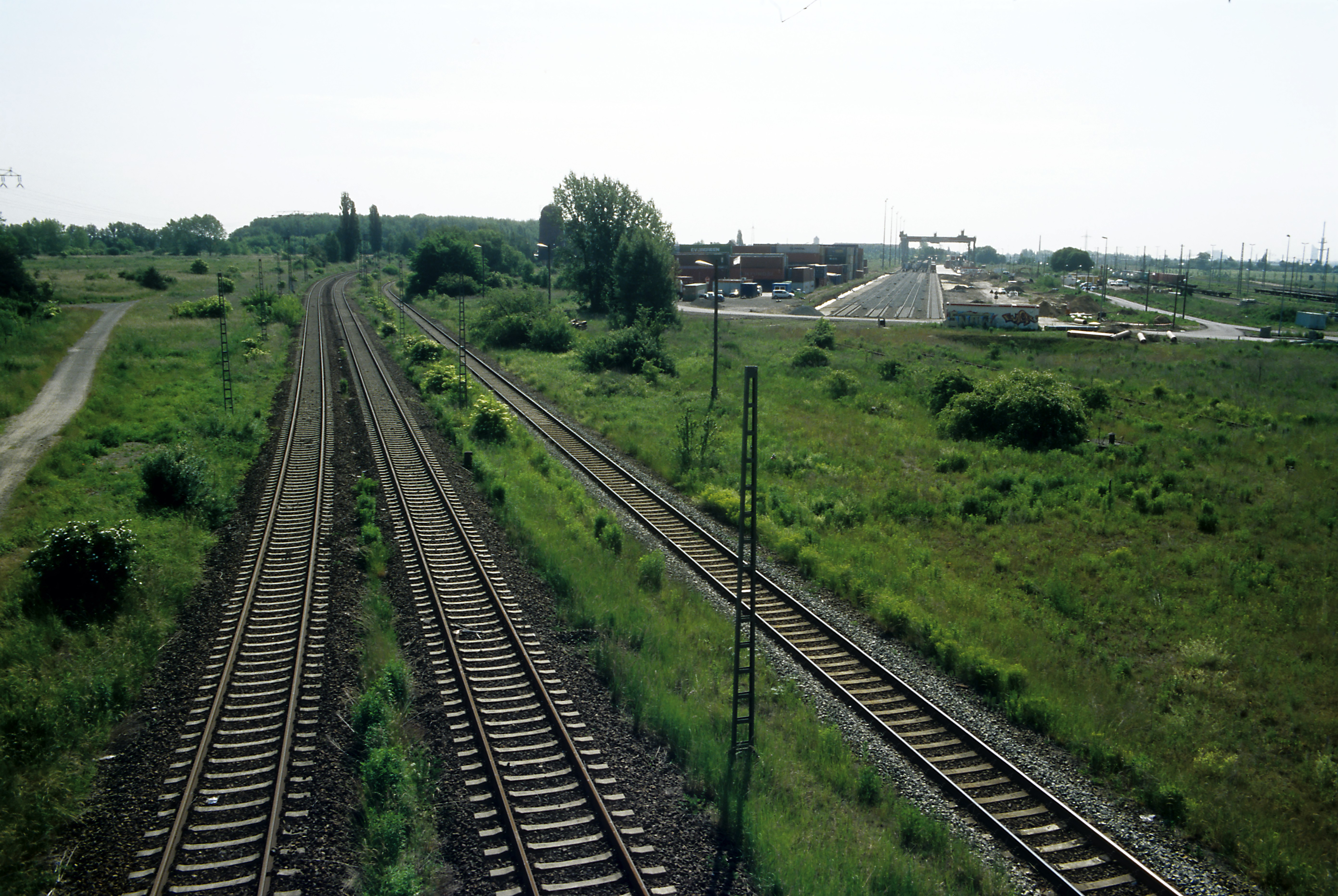 Die bis Dezember 2004 genutzten und danach abgebundenen Ferngleise der Strecke 6403, rechts daneben das Bahnhofsdurchlaufgleis. Die Fahrleitung ist bereits abgebaut worden. Richtung Osten, im Hintergrund die Wassertürme des ehemaligen Bw Wahren. Rechts davon liegt die 2001 gebaute KLv-Umschlaganlage während der Arbeiten für den Ausbau auf Ganzzuglänge.